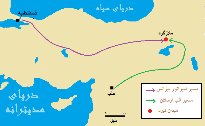 نقشه ترجمه شده نبرد ملازگرد